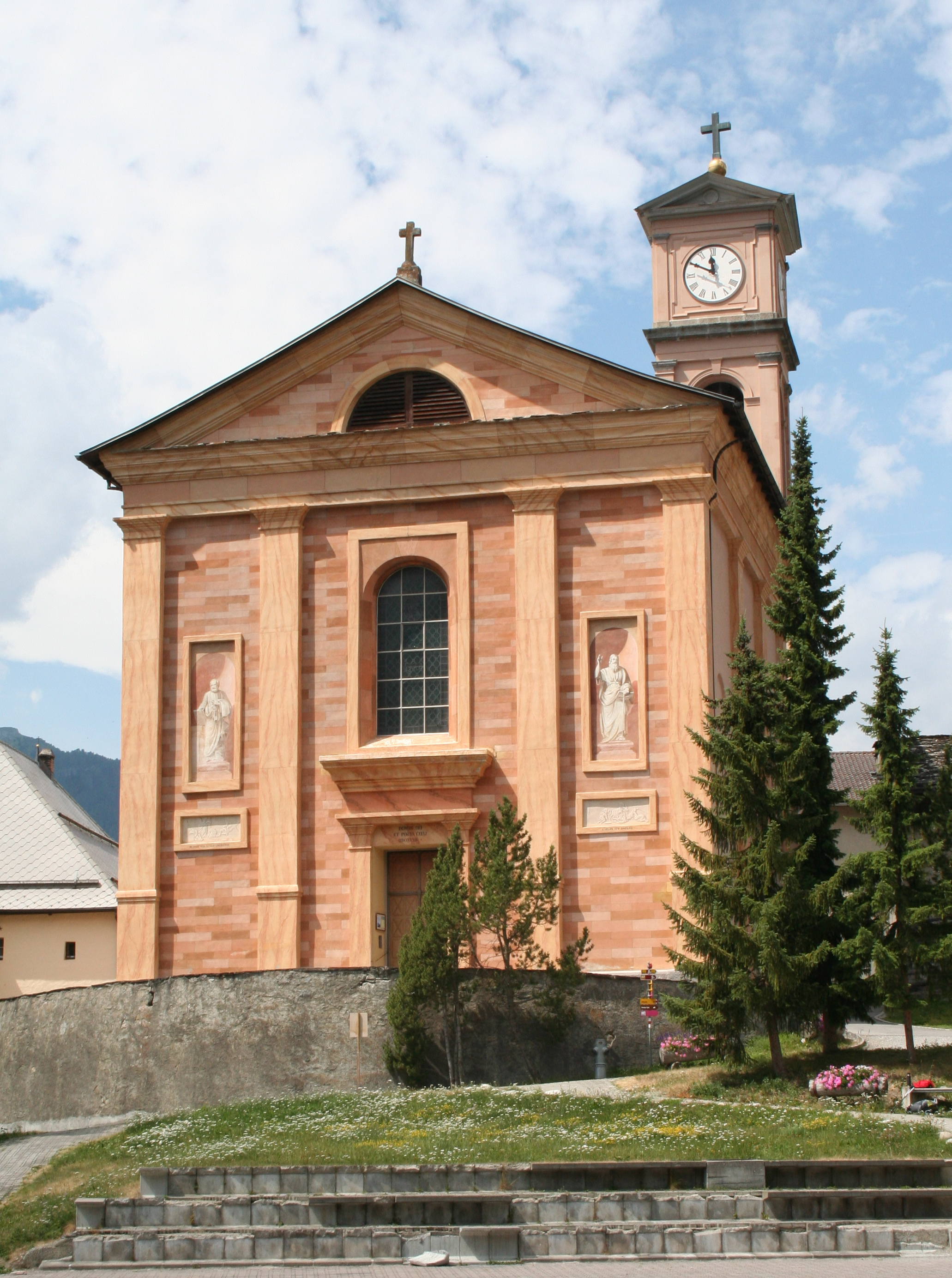 Antoniuskirche Lantsch/Lenz Fassade